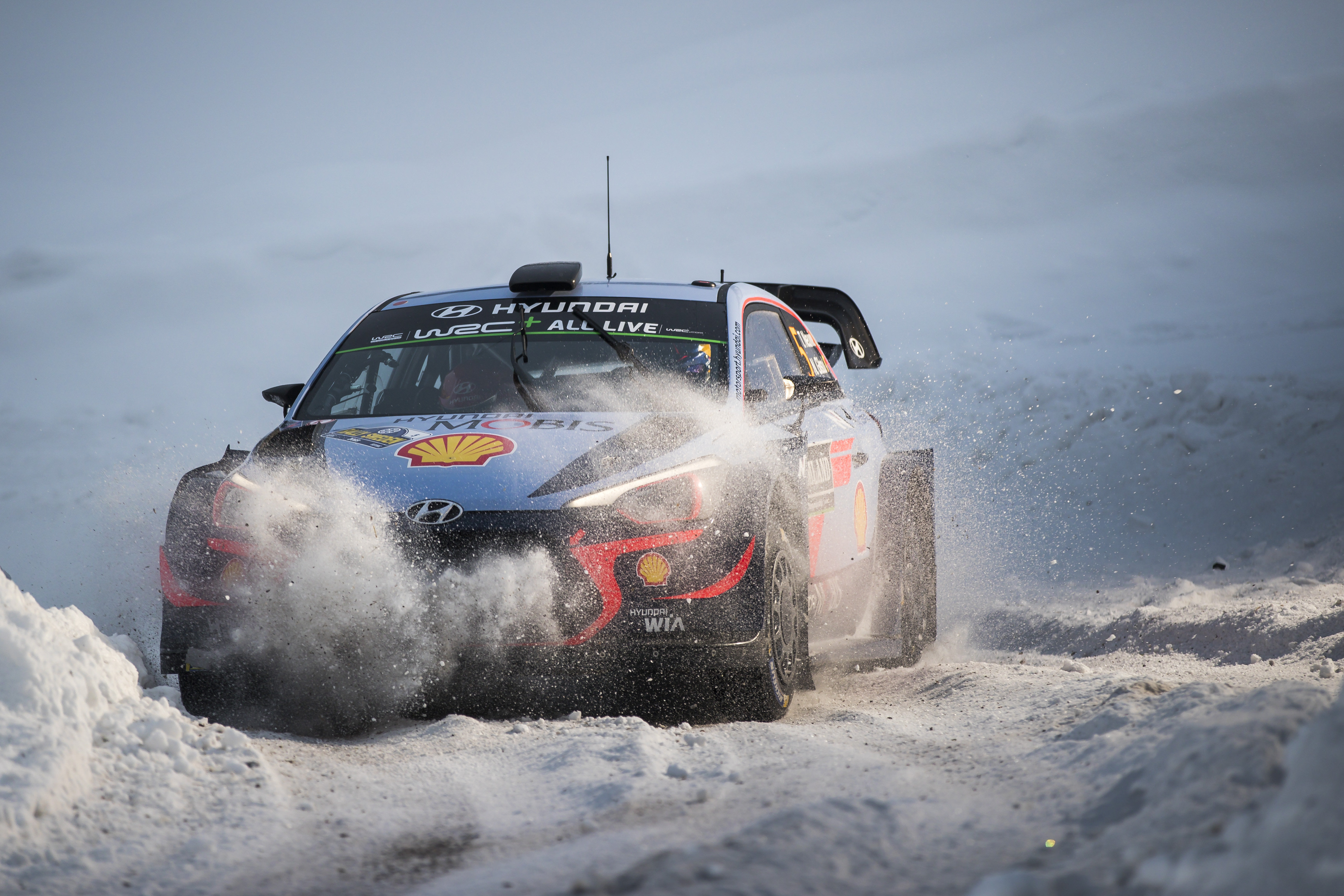 Zwycięzcy Rajdu Szwecji 2018 Thierry Neuville i Nicolas Gilsoul